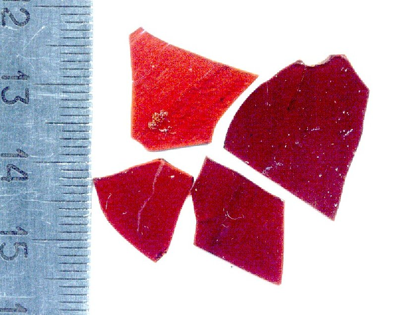 Szelak w postaci handlowej Own work 2007-01-02 Author: sobol2222